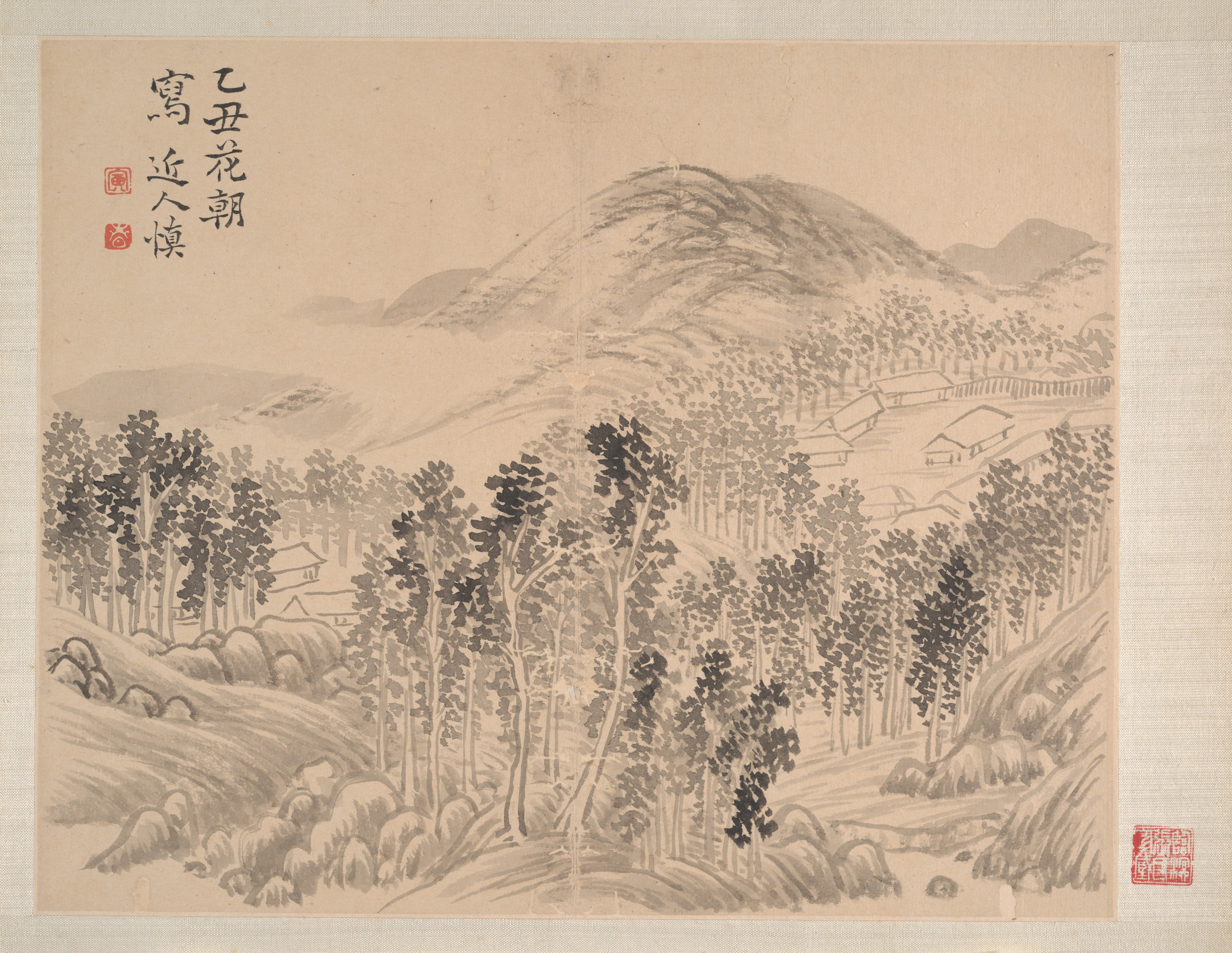 China; Album; Paintings